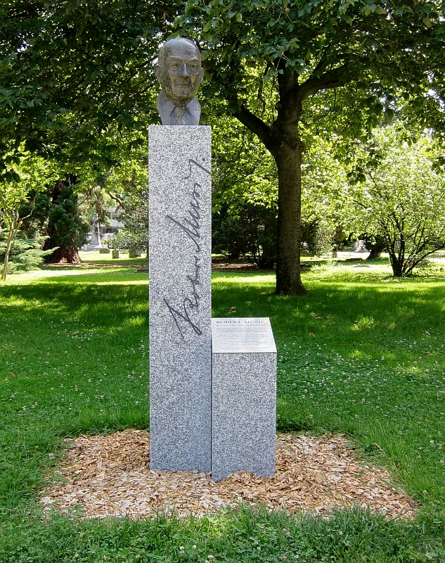 Denkmal für Robert Musil auf dem Friedhof Cimetière des Rois, Genf